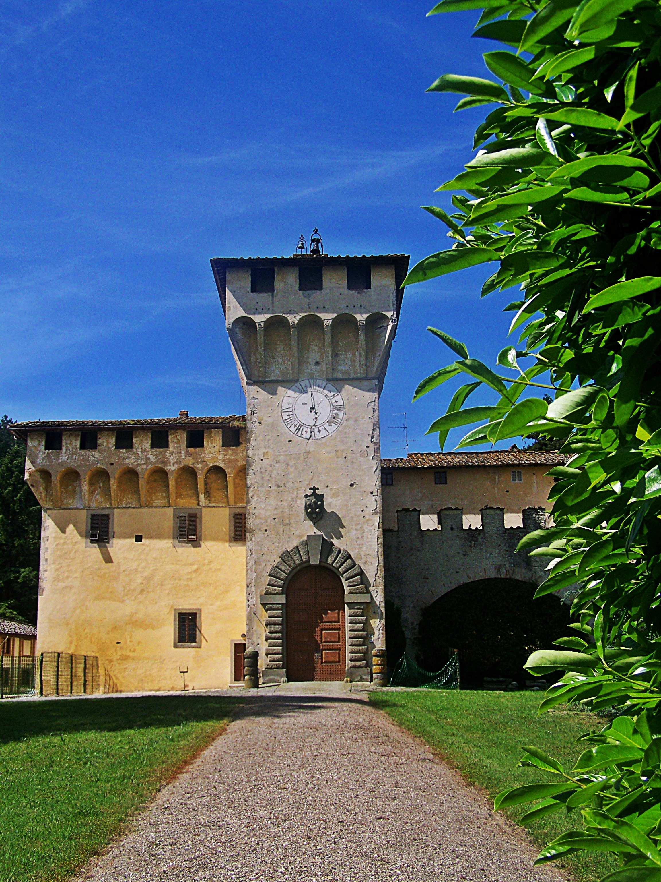 Villa